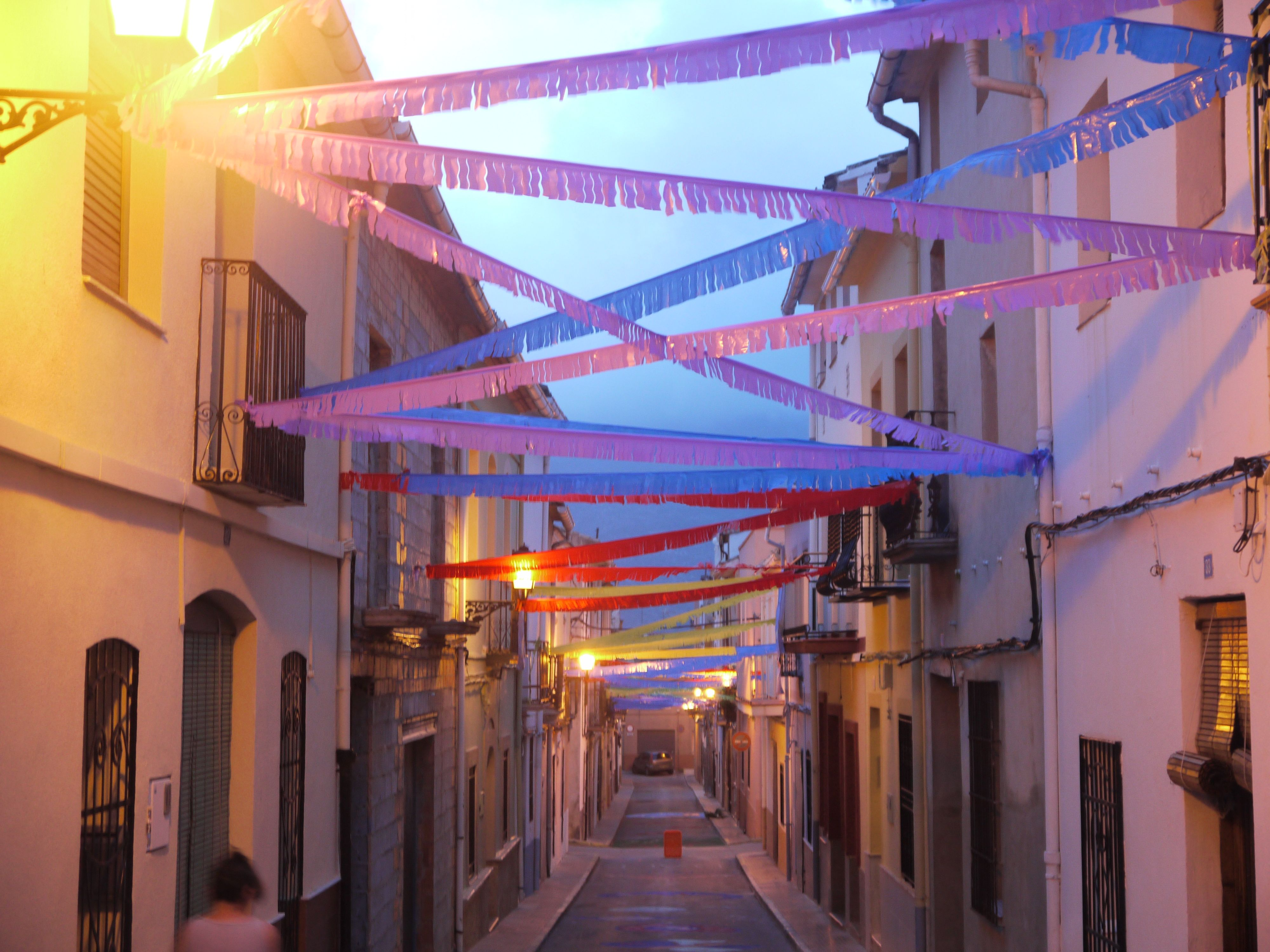 Orba, Alicante, es un pequeño pueblo de la comarca de La Marina Alta. Históricamente siempre había sido un pueblo de secano cuya subsistencia se basaba en la agricultara. Las fuertes lluvias de otoño, muy habituales en la zona, producen un rico caudal de aguas subterráneas. Con las primeras perforaciones, los primeros pozos, el paisaje de la zona cambió radicalmente, pasando a convertirse en un vergel, en un pulmón vegetal. Hoy, el valle en el que se encuentra Orba, es un extenso paisaje verde rebosante de naranjos. Los nativos son cordiales y acogedores. Su gastronomía, muy específica de la zona, es rica, especialmente la familia de los arroces. Vale la pena conocer el valle, con los pequeños pueblos arracimados en las laderas. Se llega a Orba, a través de un desvío - ocho quilómetros - que proviene de Ondara. Vía principal: autopista Valencia-Alicante.